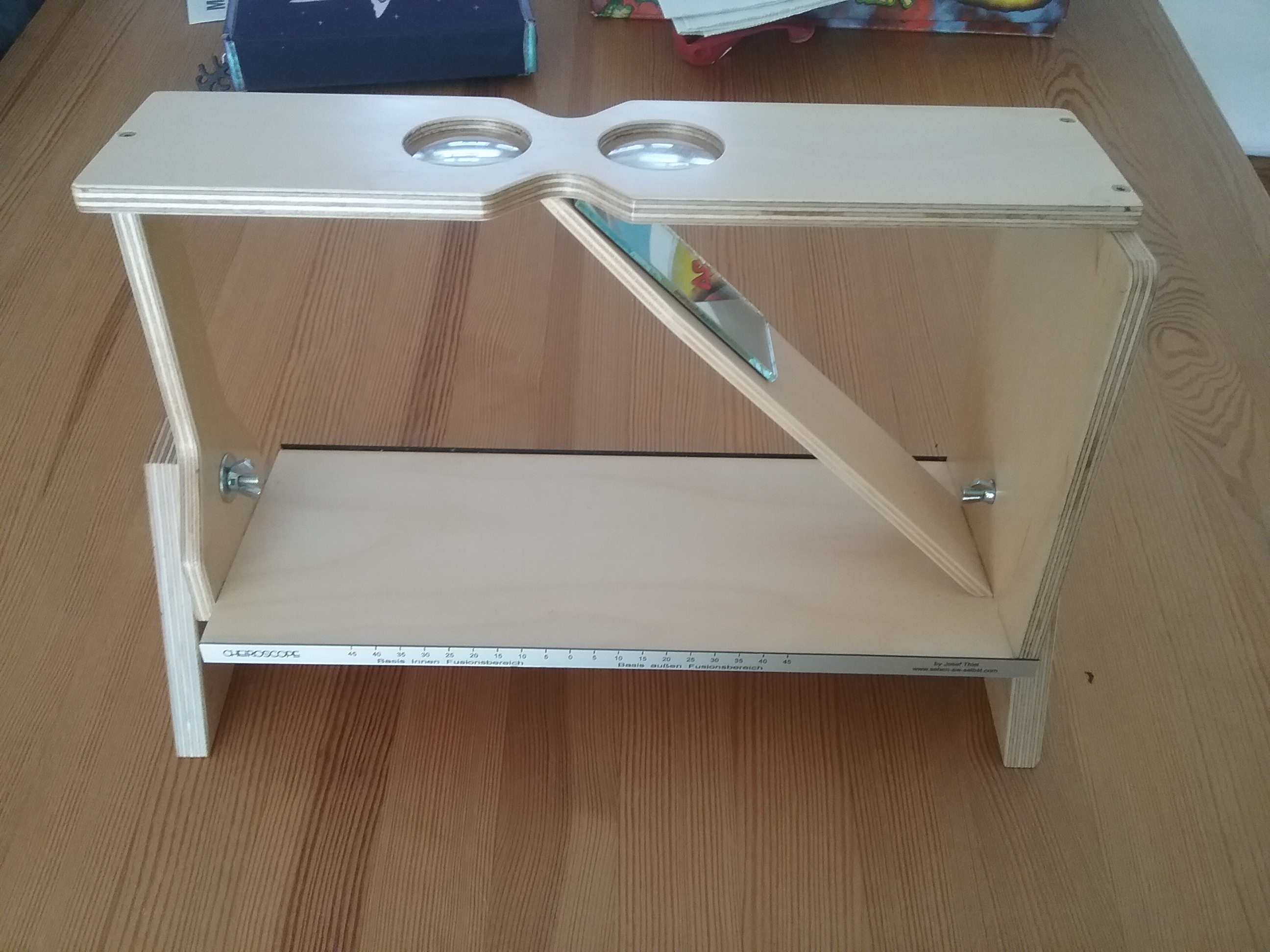 Ein entsprechender Artikel zum Stichwort wird bei Wikipedia vorbereitet.